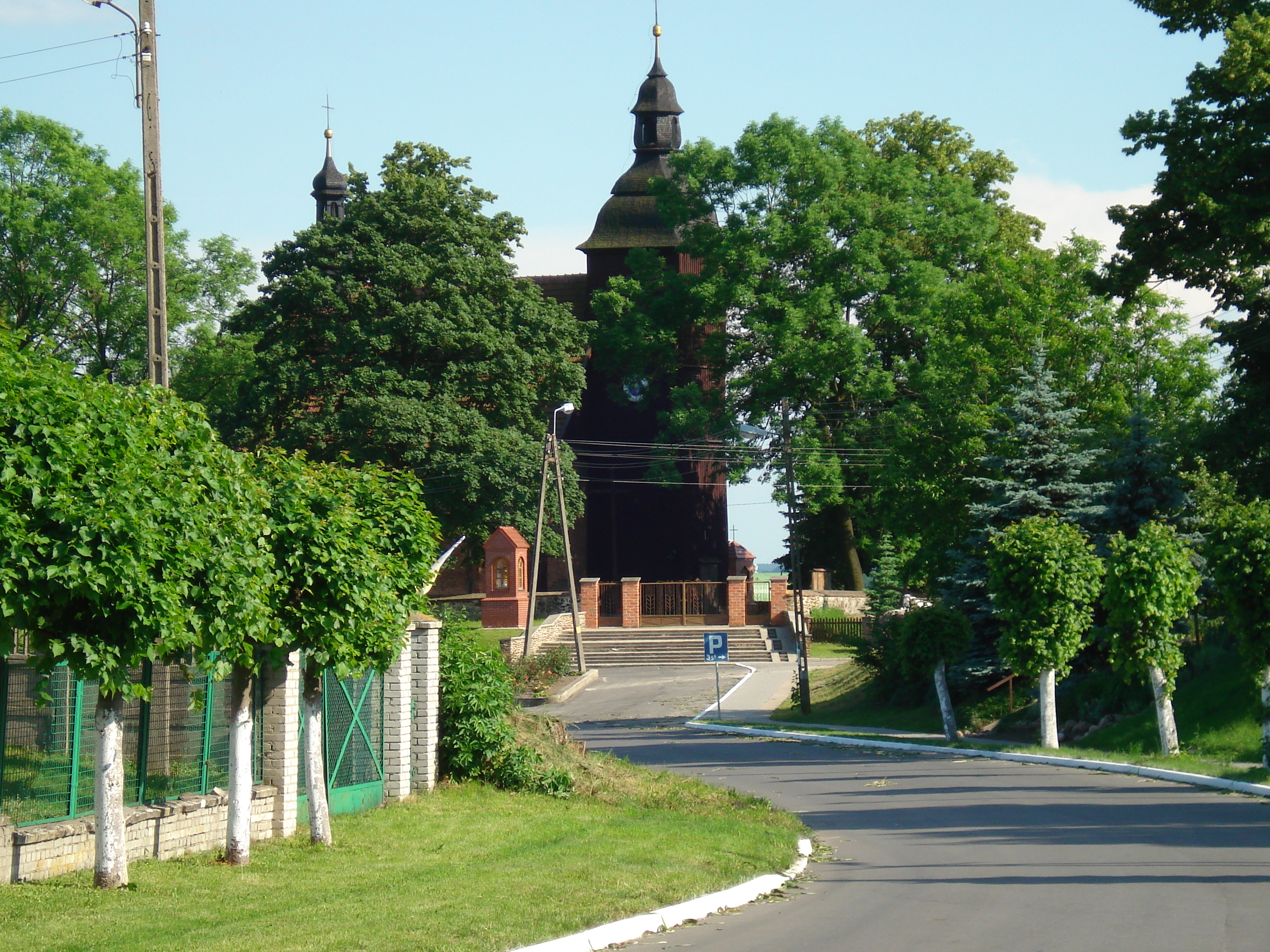 Łubnice - kościół p.w. Wniebowzięcia NMP